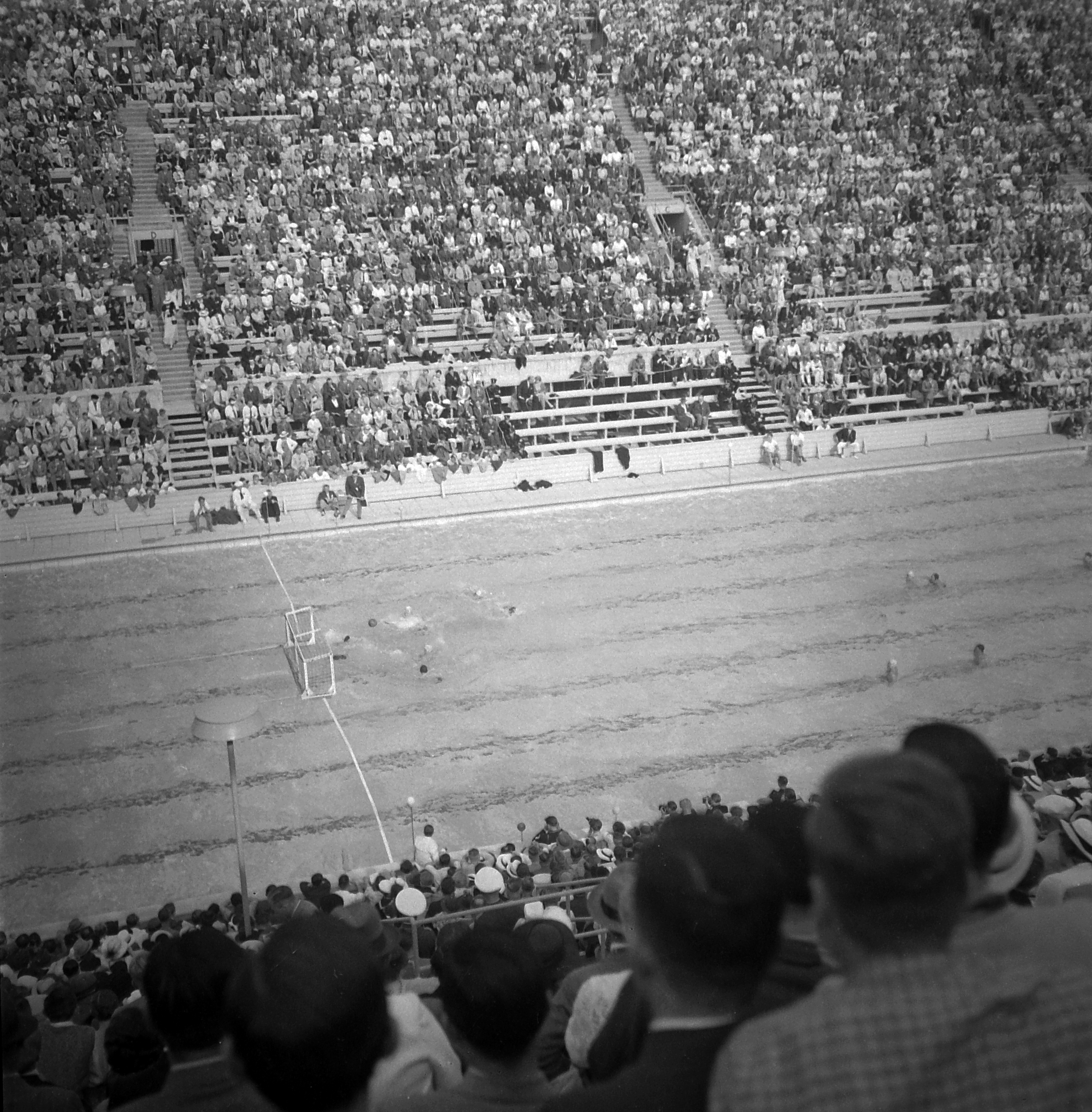 Olimpiai Úszóstadion. Olimpiai vizilabdatorna. Location: Germany, Berlin Tags: Berlin Olympics, Olympics, stadium, pool Title: Olimpiai Úszóstadion. Olimpiai vizilabdatorna.